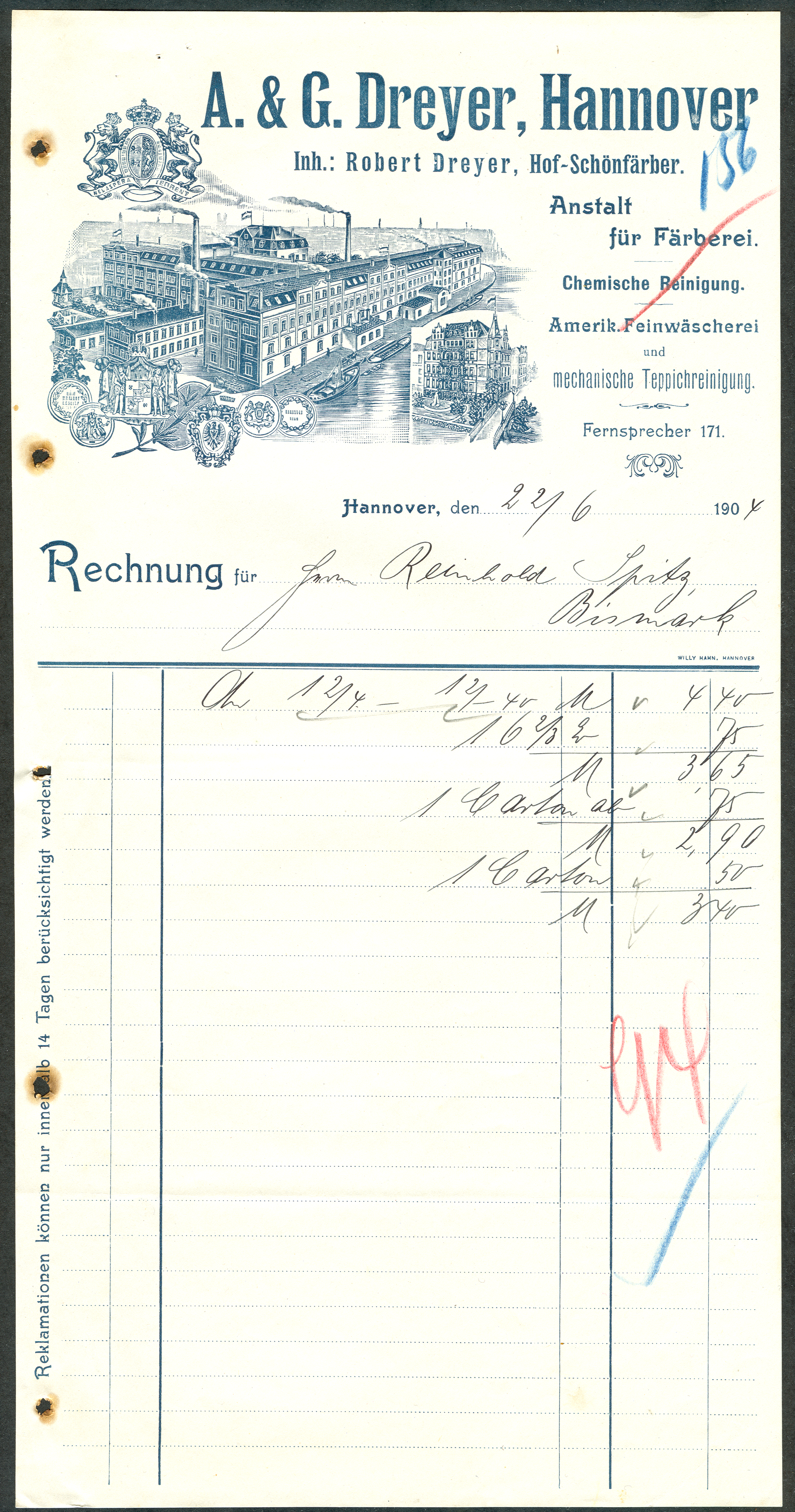 Historische Rechnung der Firma A. & G. Dreyer, Hannover, Inhaber: Robert Dreyer, Hof-Schönfärber. Anstalt für Färberei, Chemische Reinigung, Amerikanische Feinwäscherei und mechanische Teppichreinigung. Der Vergleich mit einem Rechnungsvordruck der gleichen Firma ein Jahr zuvor (1903) offenbart einen Inhaber-Wechsel von Georg zu nun Robert Dreyer. Die neue Fabrik-Ansicht zeigt einen Ausbau der vorherigen Anlagen. Eine in das Bild integrierte zweite Ansicht verweist auf die um 1903/04 errichtete Dreyerbrücke. Offenbar gibt es einen regen Schiffsverkehr mit verschiedenen Schiffen und Booten auf der Leine. Im Bild ganz links ist in einem kleinen Park hinter dem Fabriktor eine kleine Kapelle zu sehen, die möglicherweise auch den Arbeitern und Angestellten offen stand.